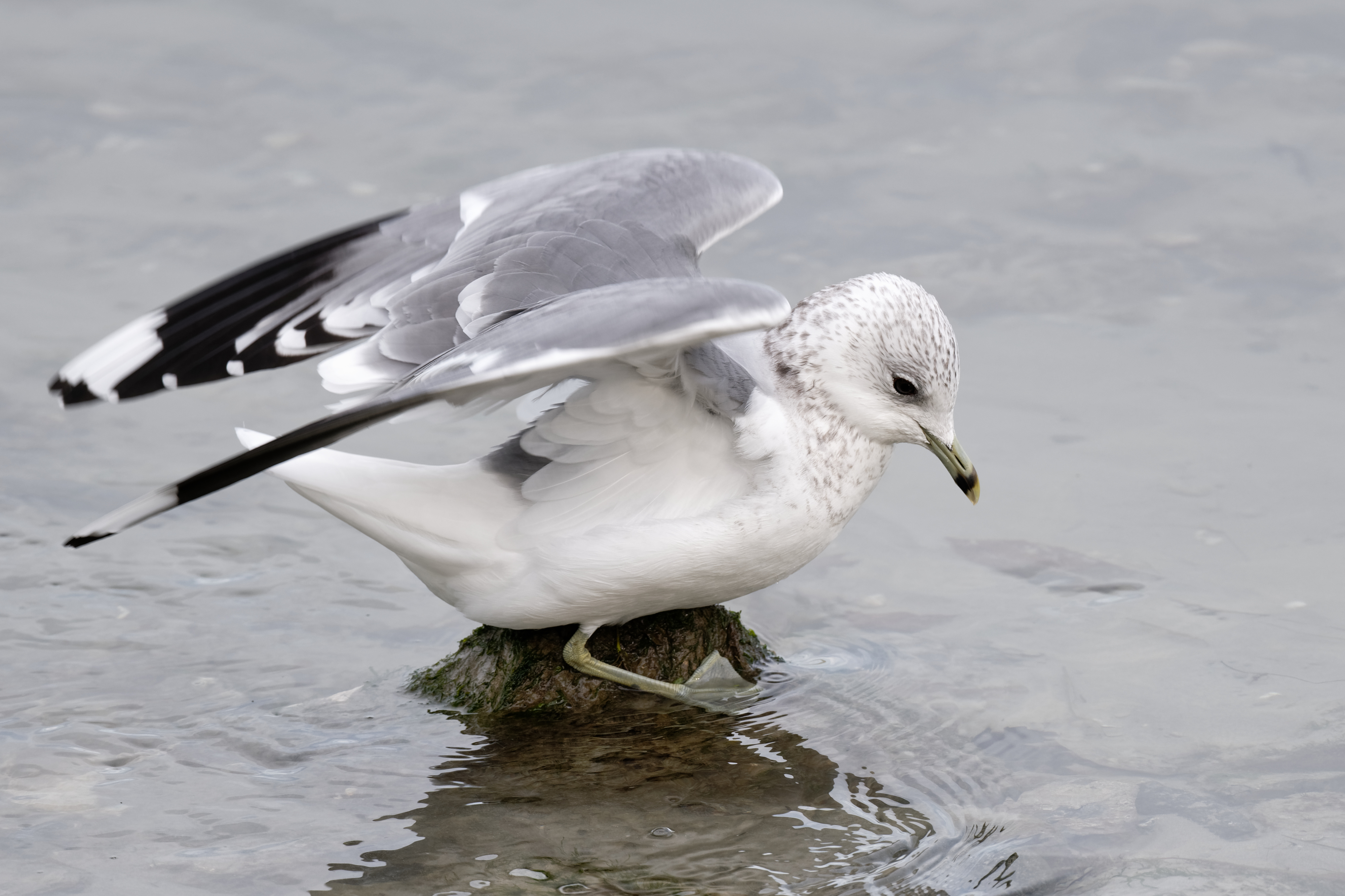 Goéland cendré (Larus canus canus) sur la plage du Hourdel, à Cayeux-sur-Mer dans la Somme.